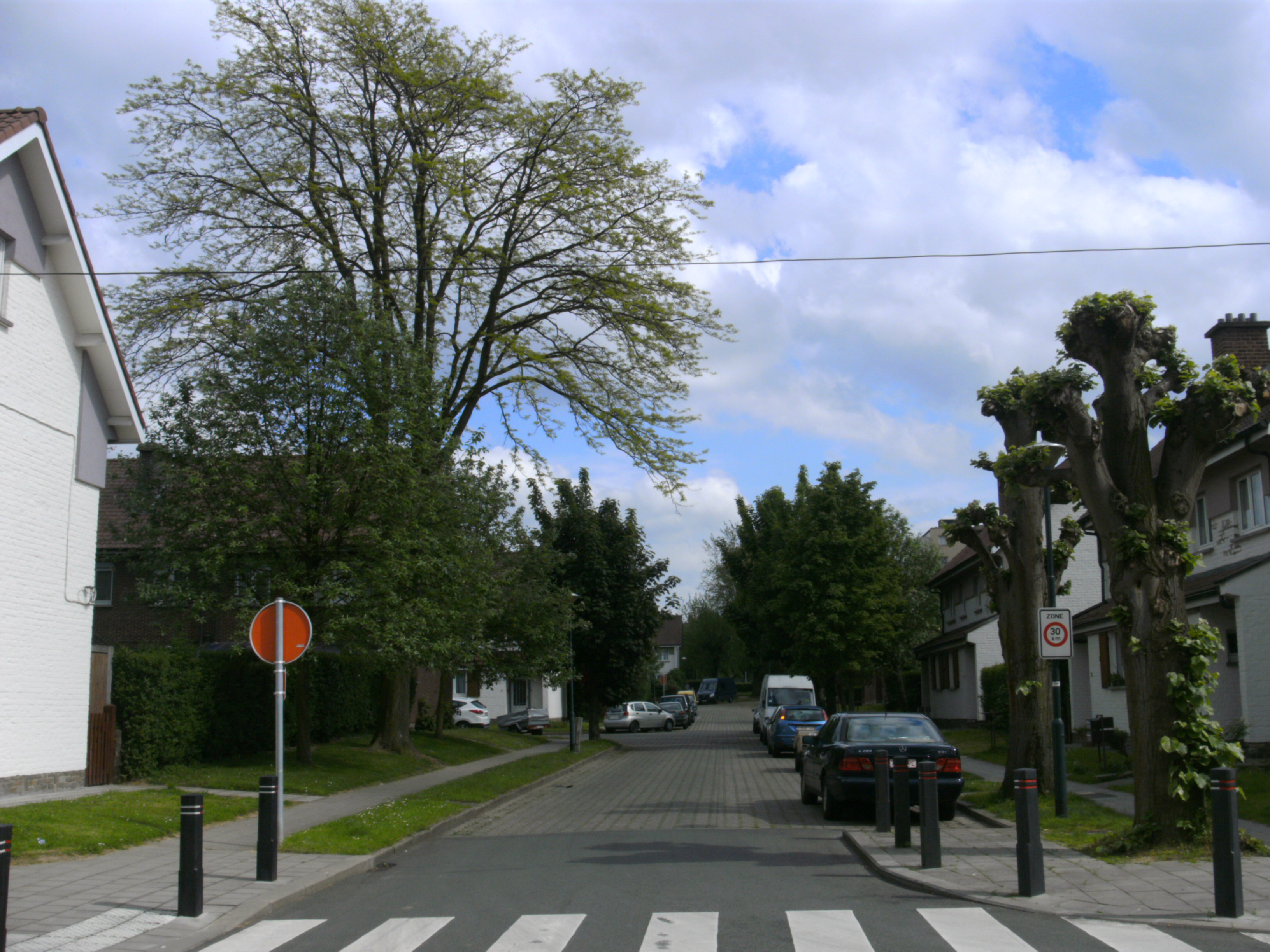 Evere - avenue du Toornoiveld